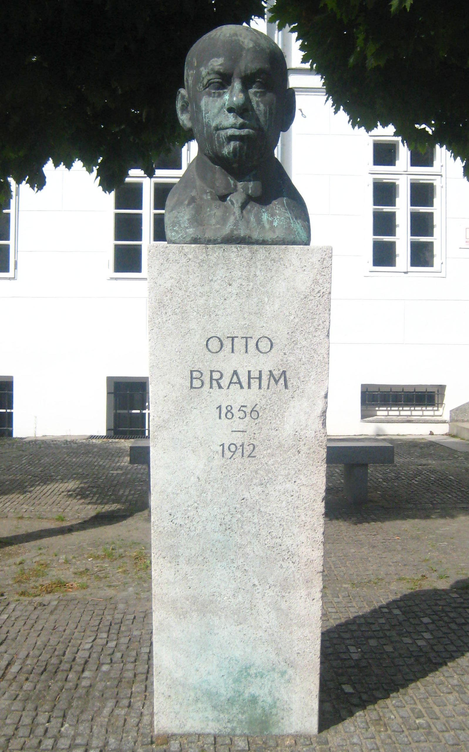 Büste von Otto Brahm (1856-1912) vor dem Deutschen Theater in der Schumannstraße in Berlin-Mitte, geschaffen 1962 von Eberhard Bachmann. Brahm leitete das Deutsche Theater von 1894-1904. Die Büste ist denkmalgeschützt.